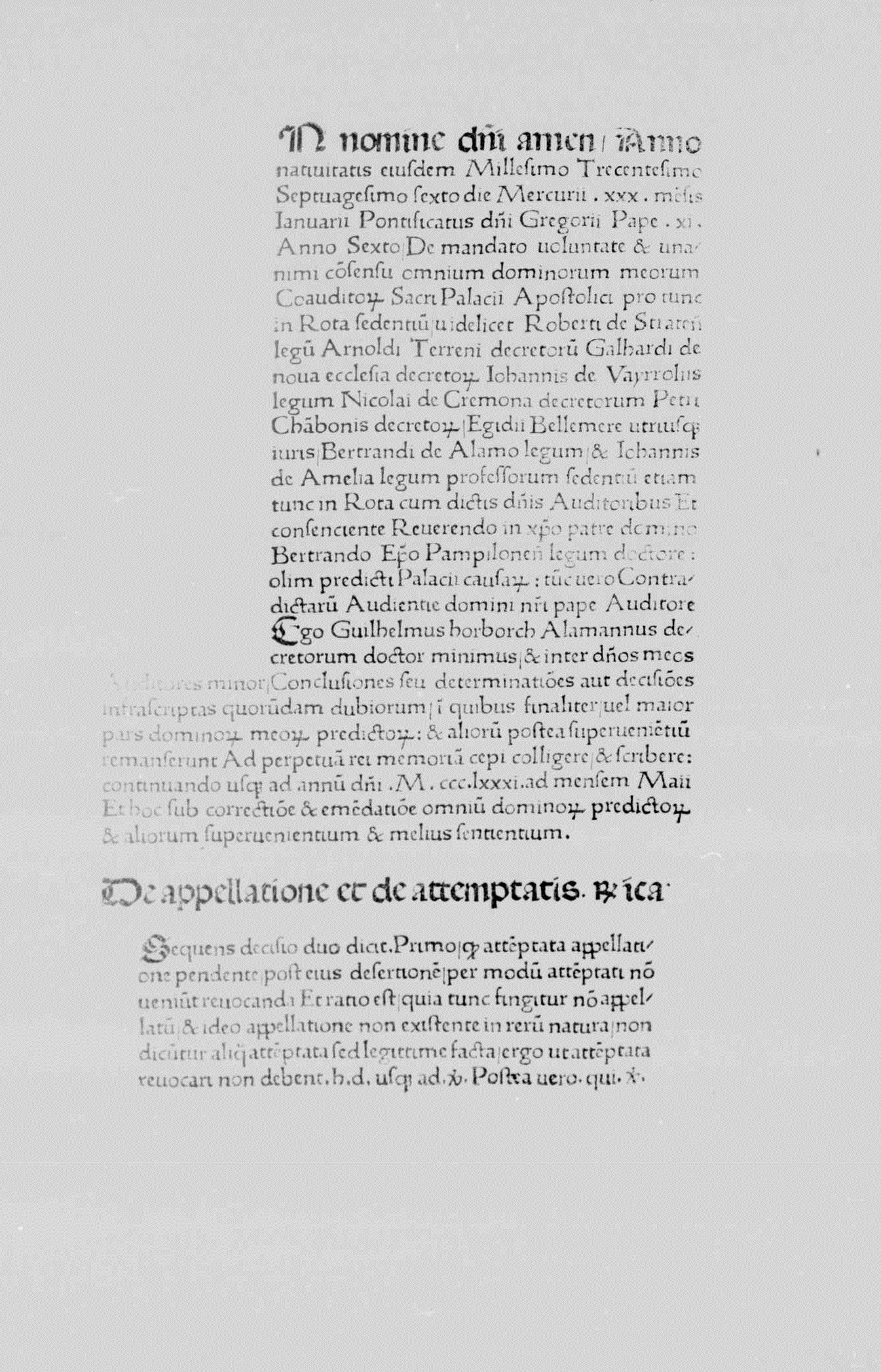 carta c2r